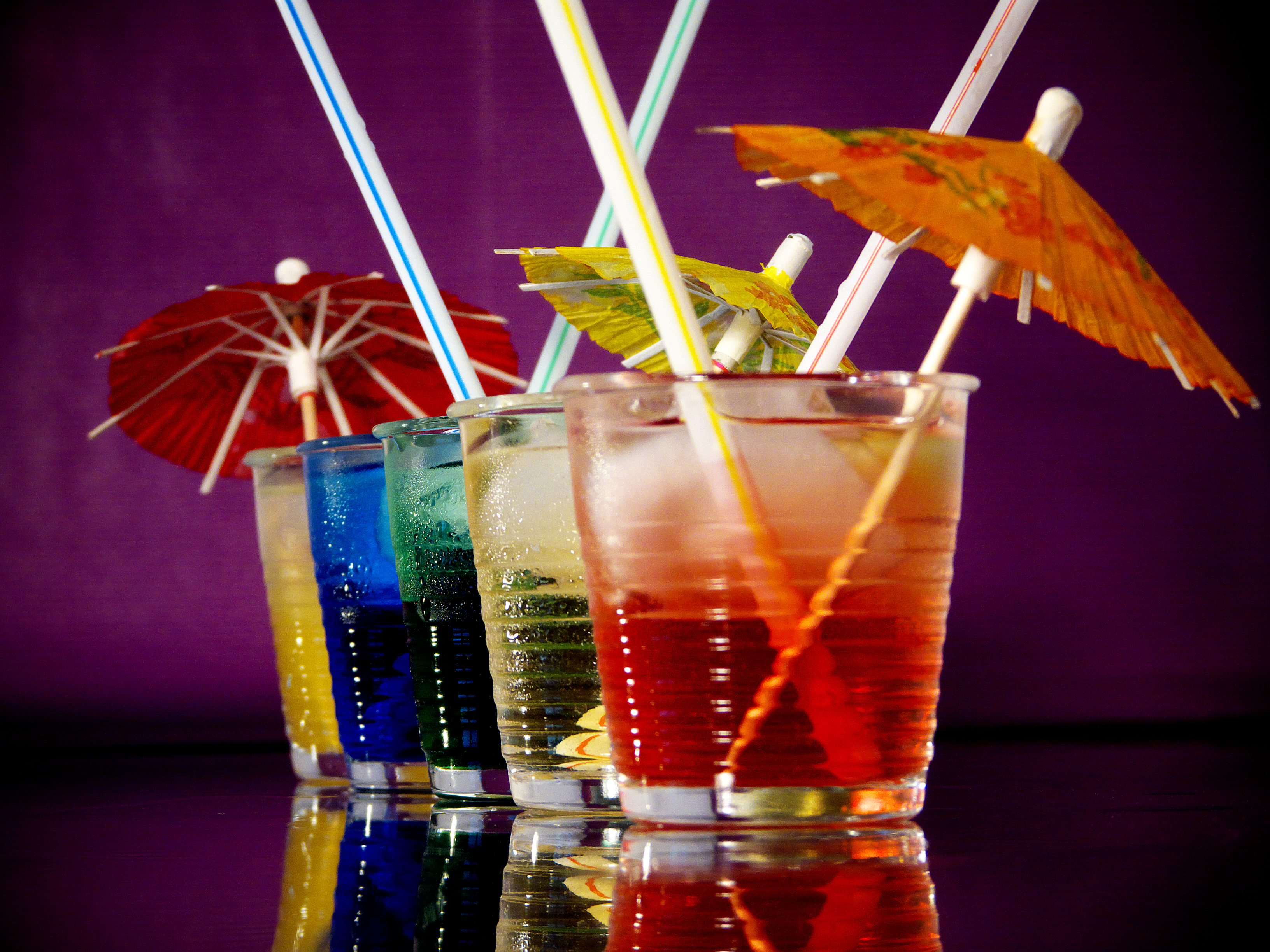 Cocktails mit Schirmchen